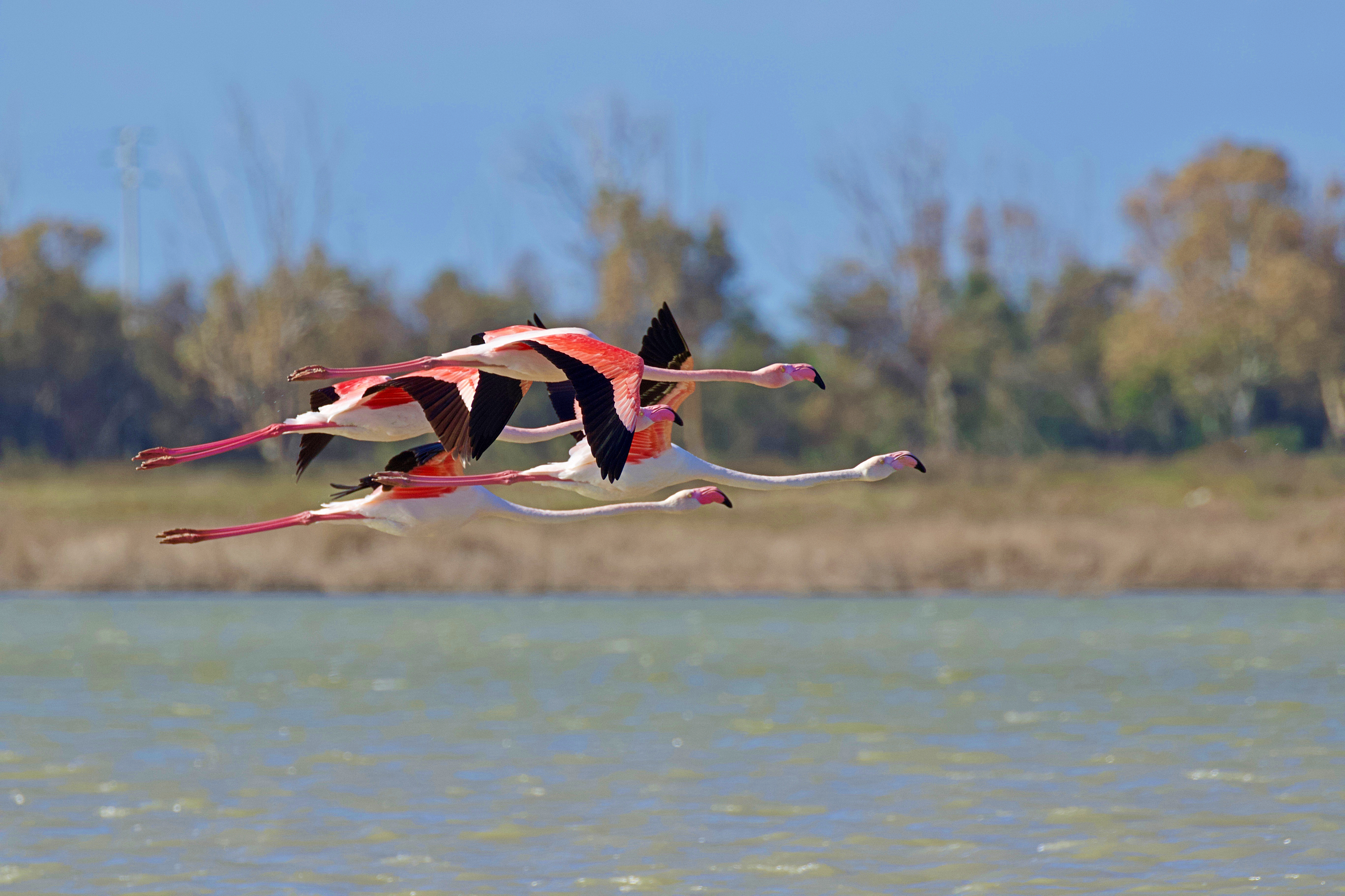 Gruppo di fenicotteri in volo presso Pantani Longarini - Sicilia